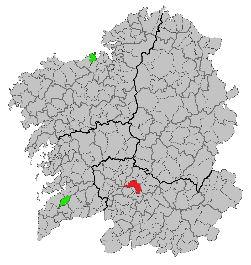 Mapa de extensión da gripe mexicana en Galicia